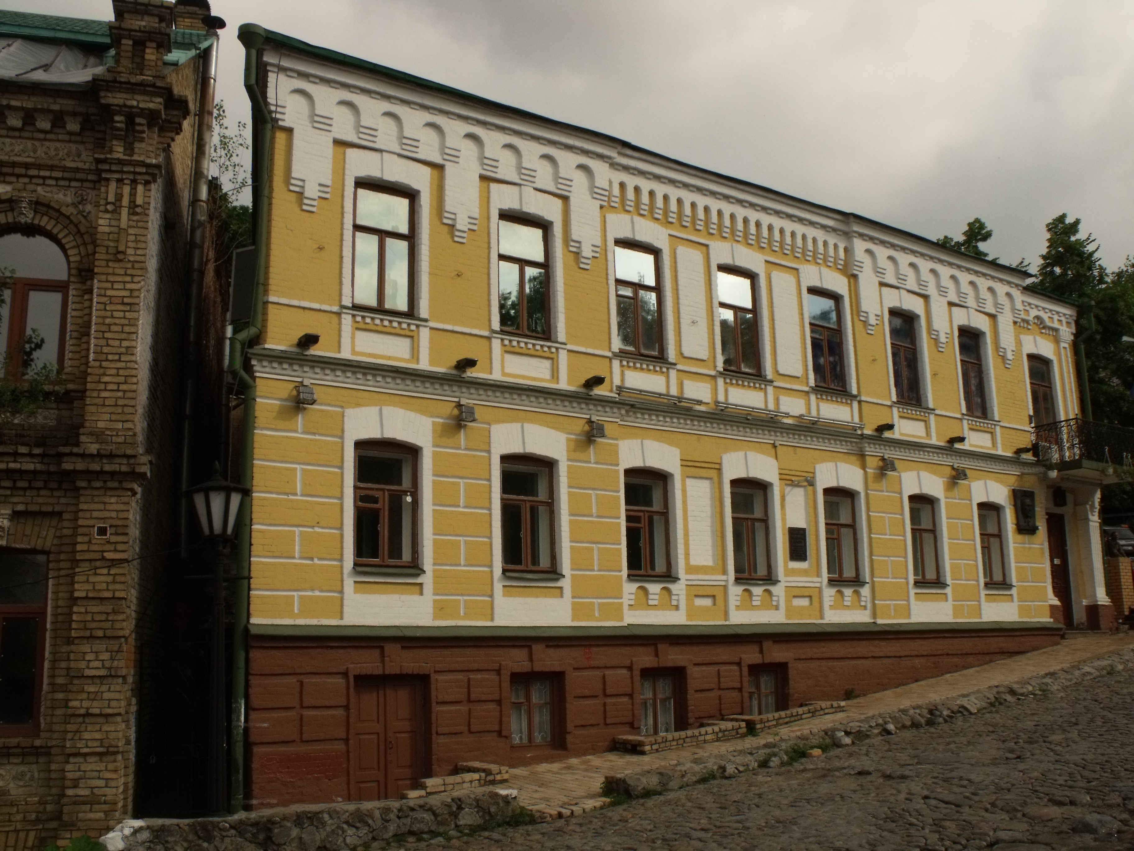 Будинок житловий, в якому у 1906—1922 рр. мешкали М. О. Булгаков, радянський письменник; родина Булгакових; у 1906 р. О. А. Кошиць, композитор, хоровий диригент; В. П. Листовничий, цивільний інженер, архітектор